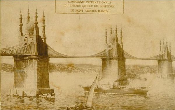 Cisr-i Hamidi, Rencana pembangunan jembatan di atas Selat Bosphorus pada masa Abdulhamid II